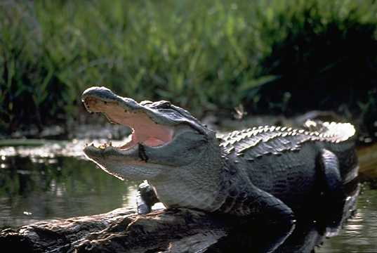 Alligator mississipiensis